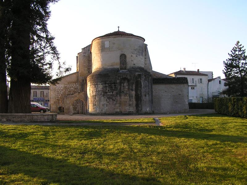 église St Vivien de Pons